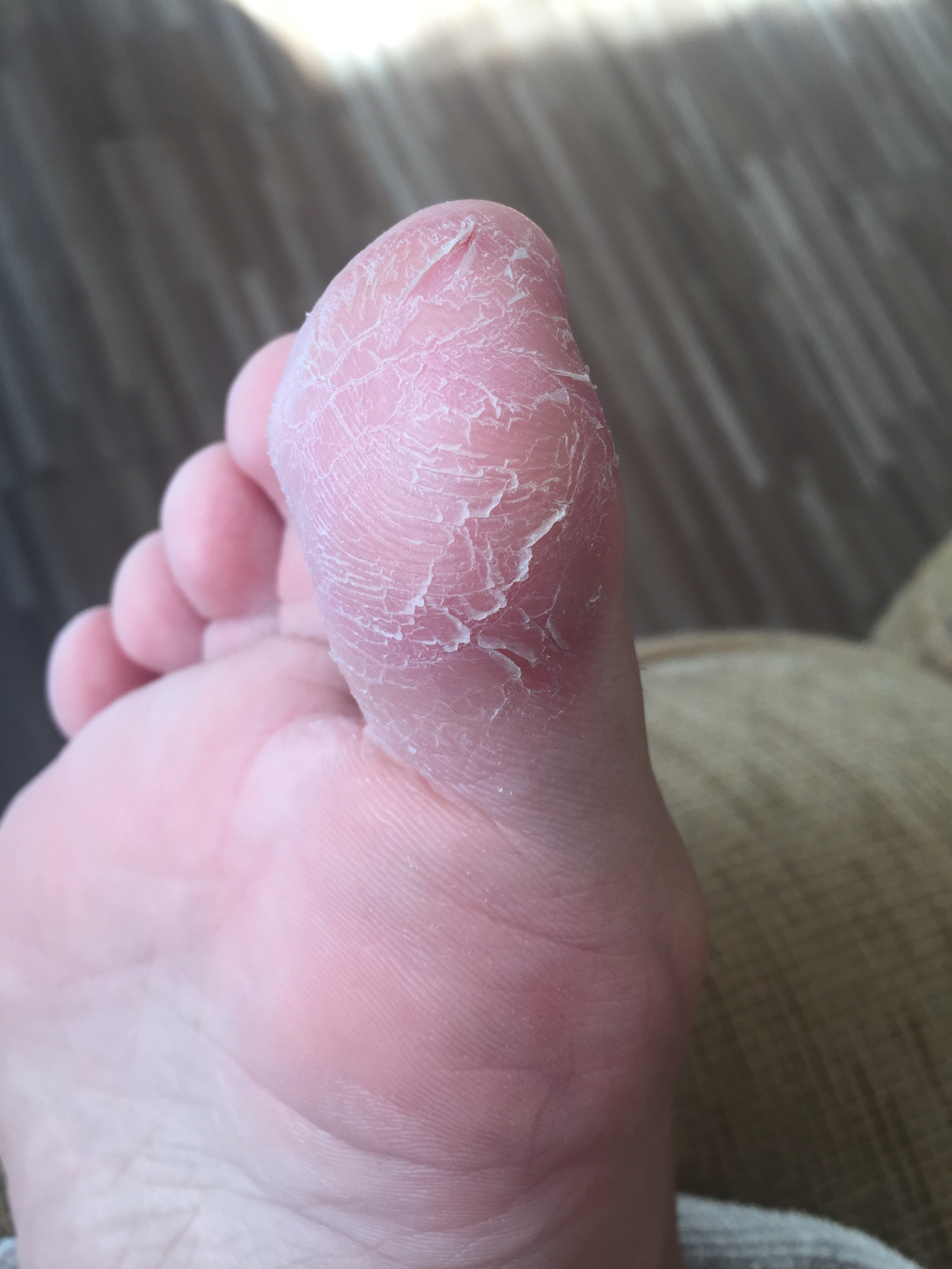 Mycose localisée sur le gros orteil